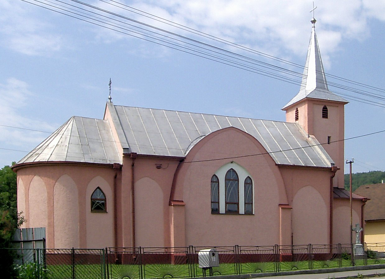 Závadka - historickou dominantou obce rímsko-katolícky klasicistický kostol postavený v roku 1770